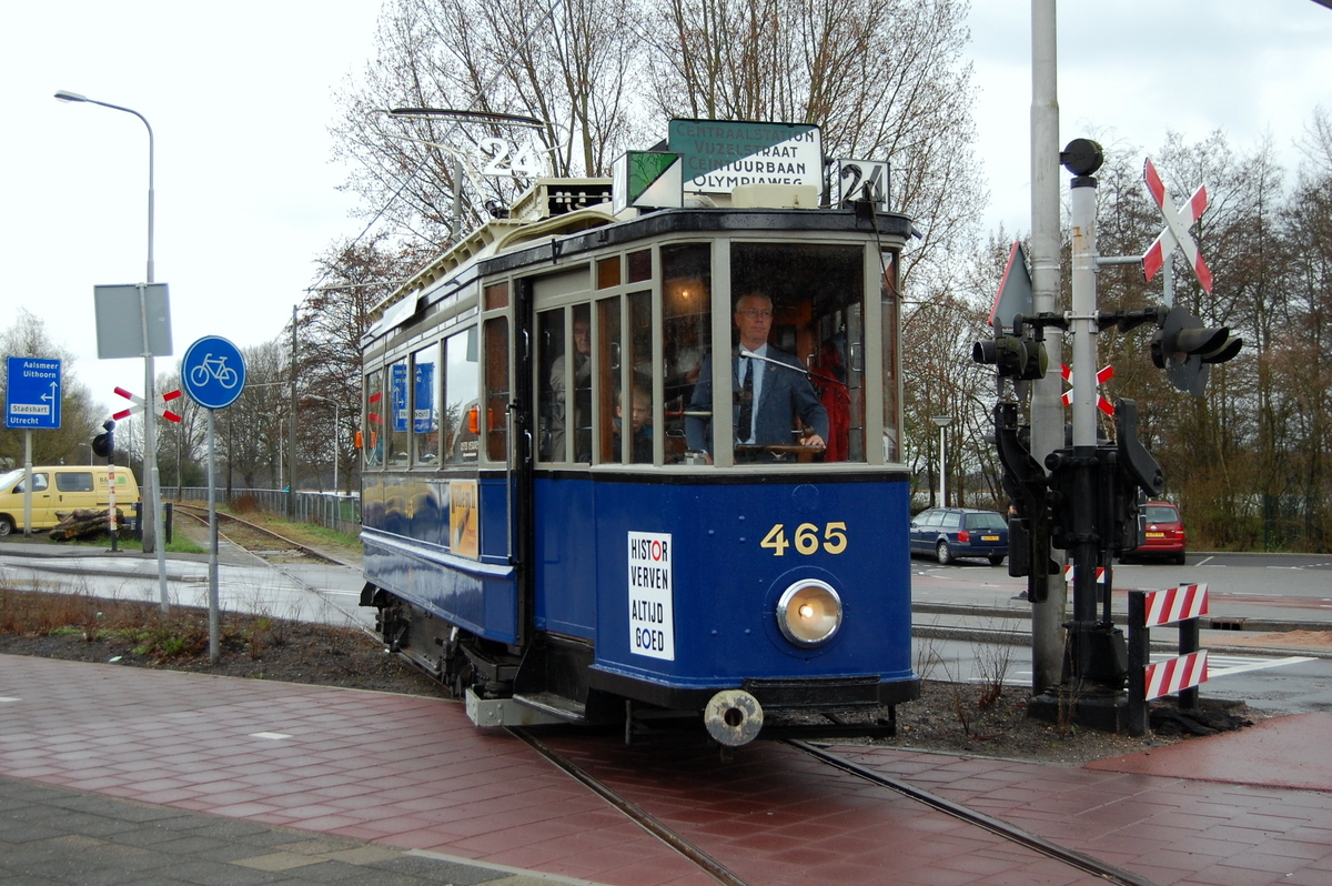 NL: Amsterdamse motorwagen 465 (bouwjaar 1929) op de Electrische Museumtramlijn Amsterdam bij de Handweg te Amstelveen. En: Old Amsterdam tram 465 (1929) on the Electrische Museumtramlijn Amsterdam, at Amstelveen.